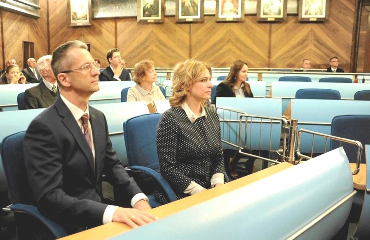 Leszek Sagan